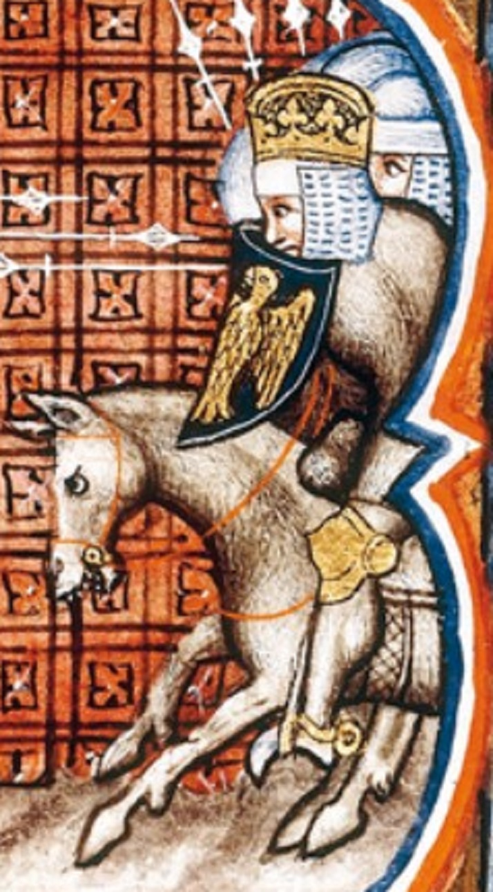 Bataille de Bouvines entre Philippe Auguste et l'empereur Otton IV (1214). Grandes Chroniques de France. France, Paris, XIVe siècle. Paris, Bibliothèque Nationale de France, Dèpartement des manuscrits, Français 2813, folio 253 vÂ° 60 x 65 mm